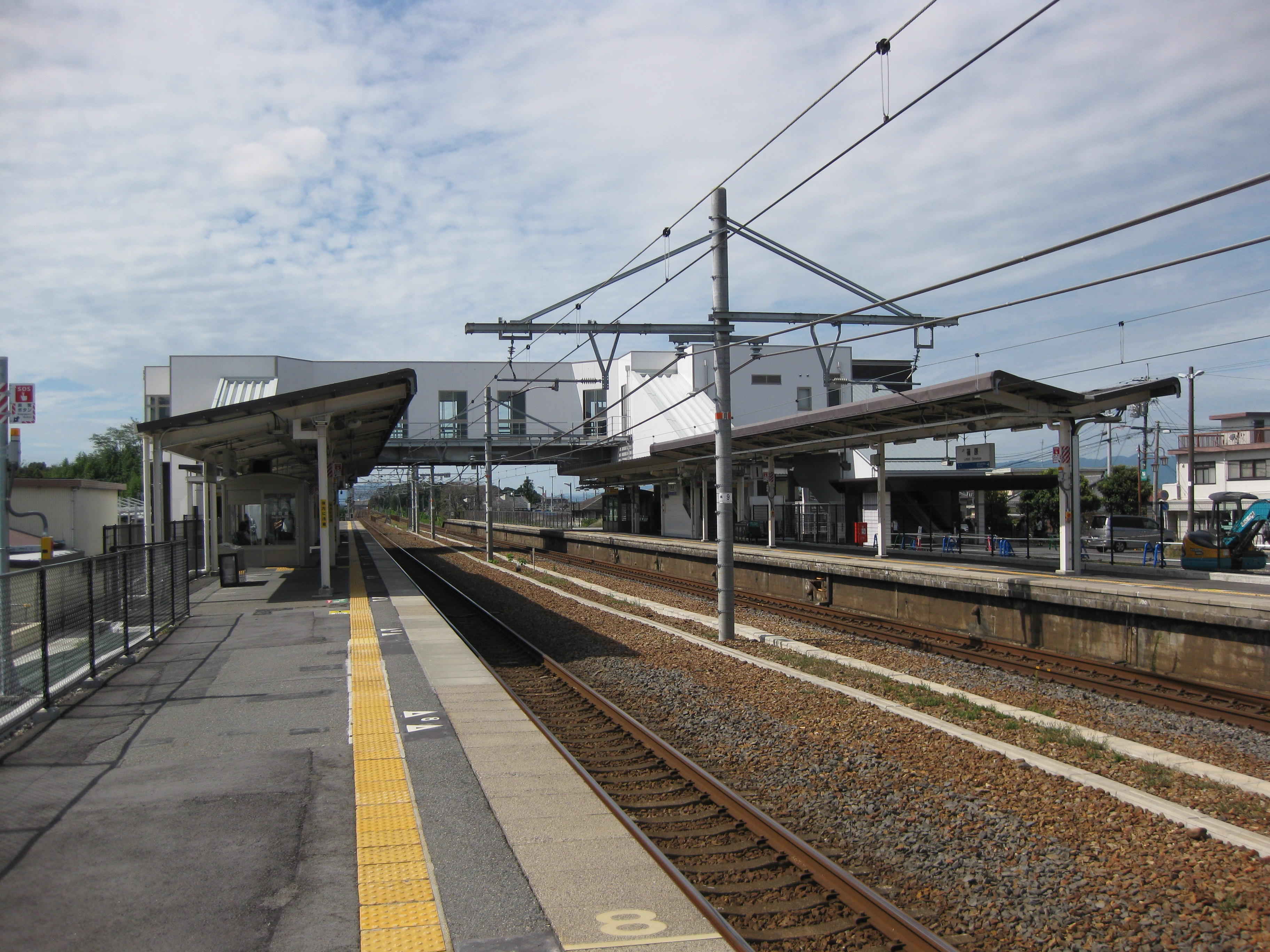 篠原駅プラットホーム